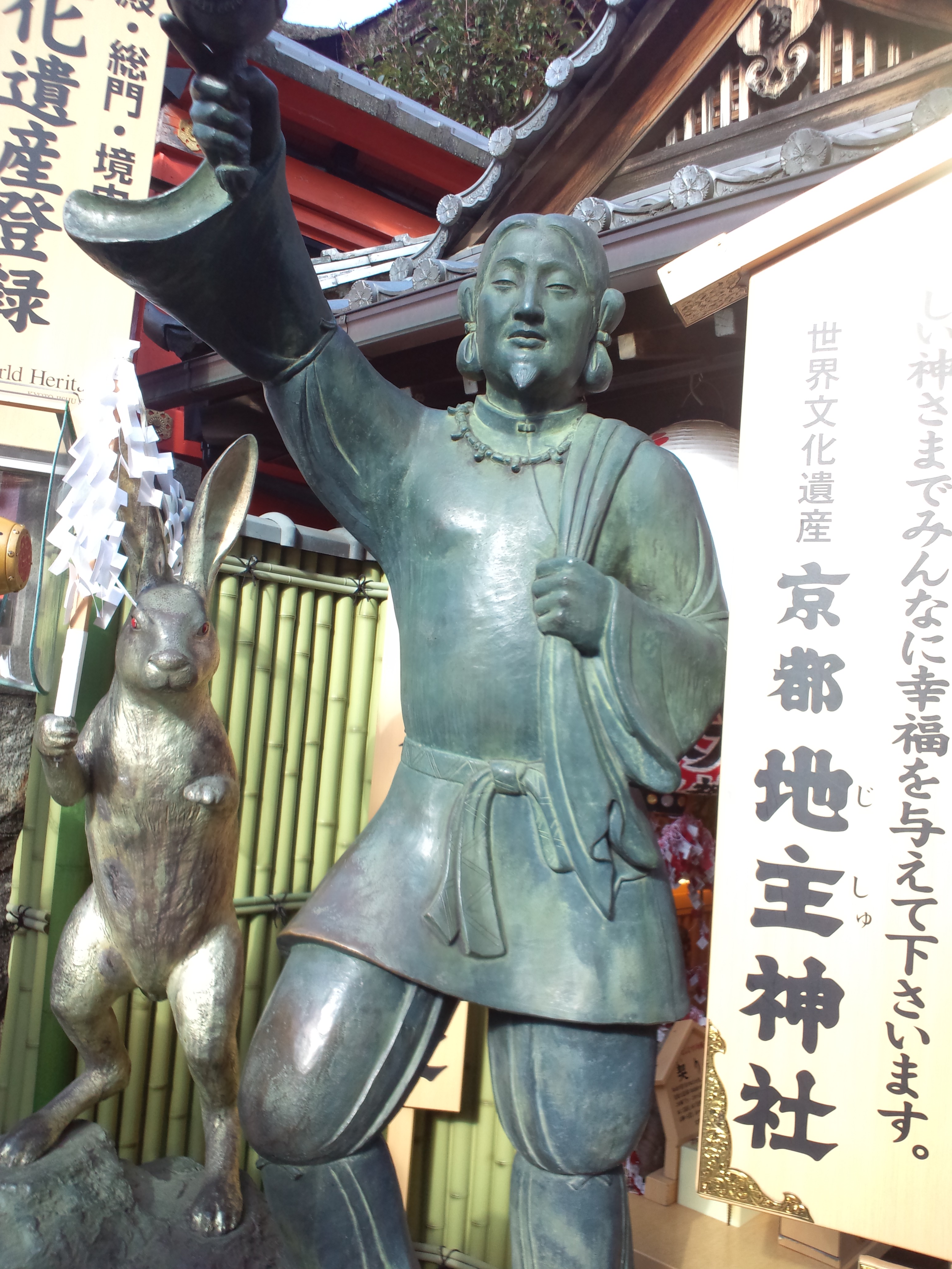 地主神社 大国主と白うさぎの像